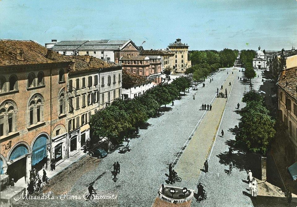 La piazza Costituente di Mirandola in una cartolina storica del 1950